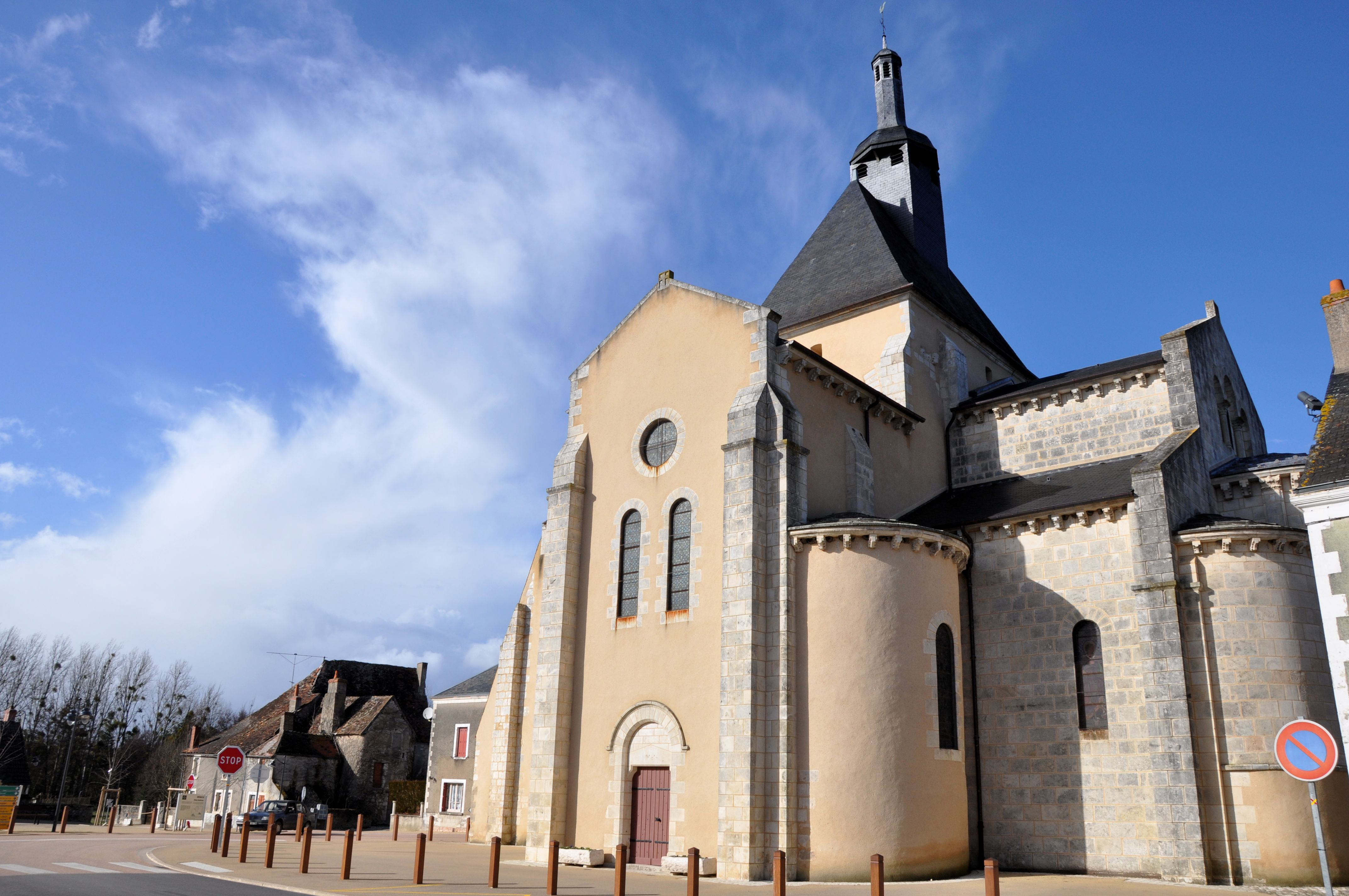 This building is en partie classé, en partie inscrit au titre des Monuments Historiques. .